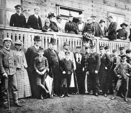 Gruppebilde utenfor kontoret i Furulund. Første rekke fra venstre: David Thelander, fru dir Corneliusen, foran hans sønn, sogneprest Olav Amundsen, Konsul Nils Persson og sønn til Persson, hans datter Hildur, ukjent, Sture Persson-Henning, Hasselbom, To gutter, Anfindsen, og Frue. På balkongen fra venstre Fredrik Påske, Olaf Amundsen, Sønner av presten, Fru Amundsen, ukjent og datter til Persson. På gelender Marte Persson-Hanning, ukjent, ing Shytz med hatt. Fredrik Påske ble professor i litteratur, Olav Amundsen ble fylkesmann i Norland. 1892 SG.F.10009-1871